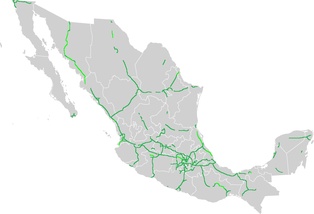 mapa de la red nacional de autopistas de méxico